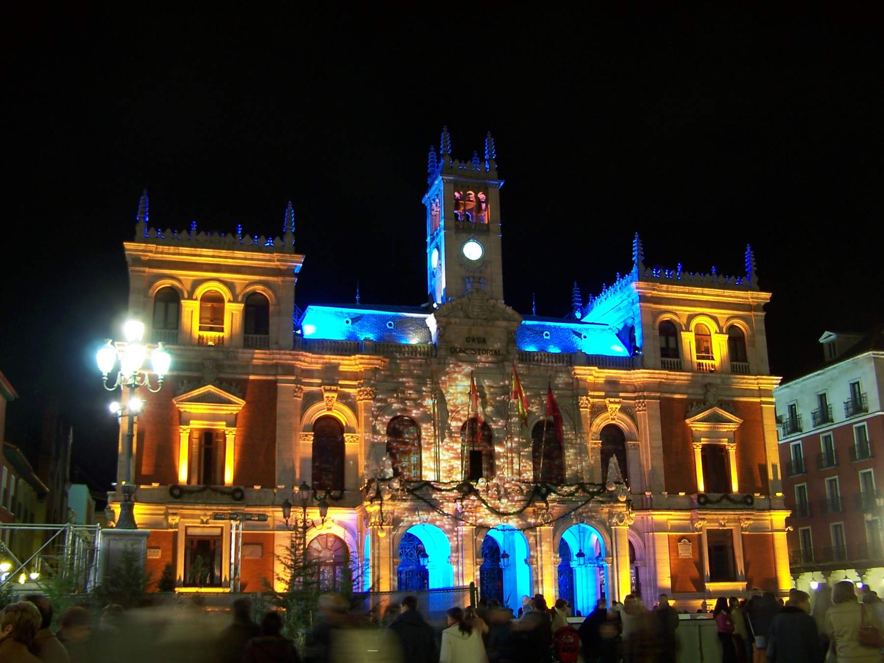 Es la Plaza Mayor de Valladolid, la fachada del ayuntamiento concrétamente. Está iluminada con focos de colores, aunque me ha quedado un poco sobreexpuestas algunas zonas. En la parte central se sobreimpresionaban dibujos. Foto bajo licencia creative commons, la puedes copiar, modificar y distribuir, siempre que indiques el origen y reconozcas la licencia de la foto. La foto la hice yo con mi cámara de fotos digital.